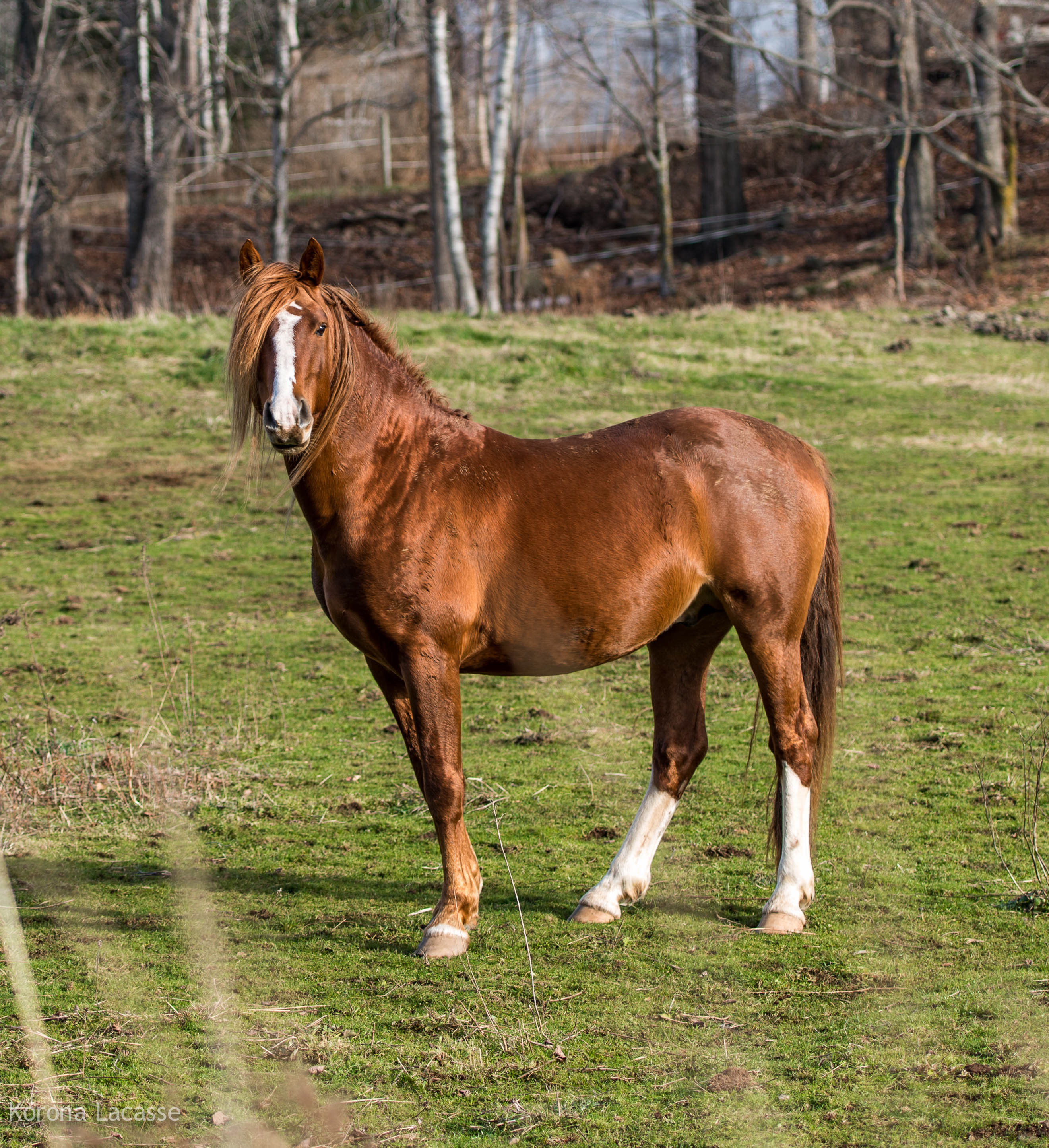 Horse